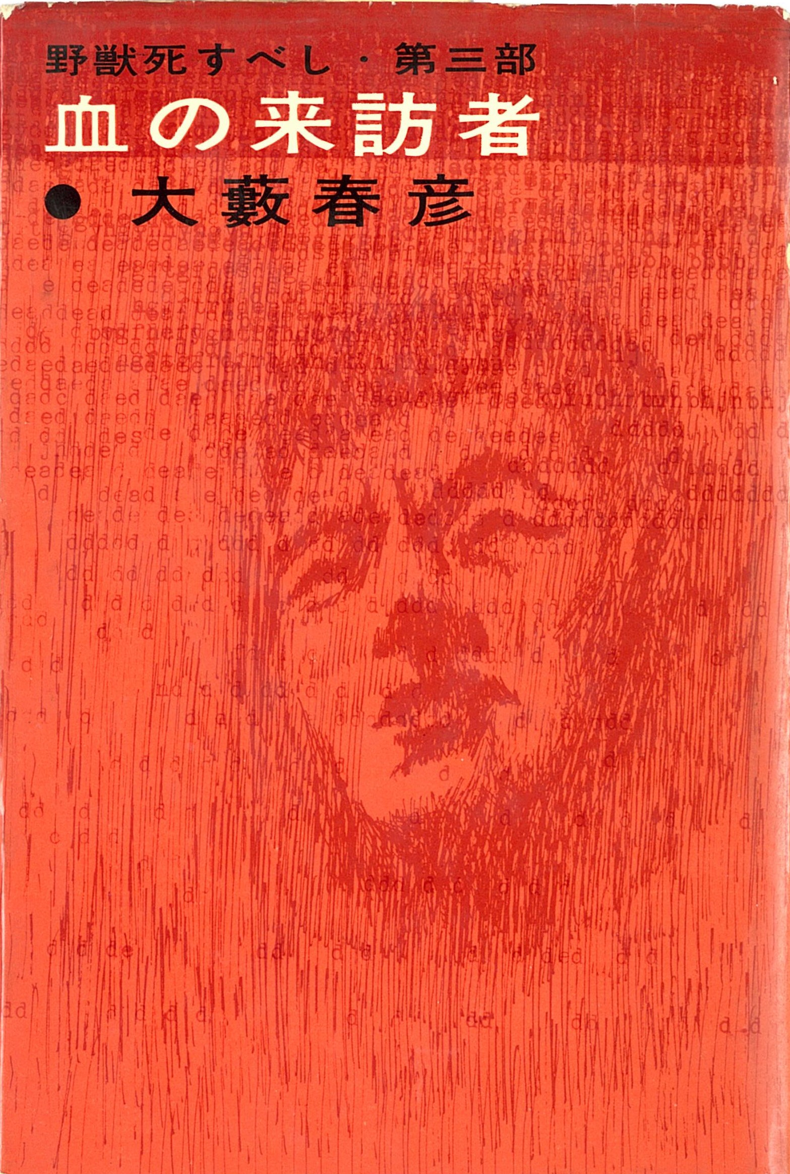 大藪春彦『血の来訪者』1961年初版 新潮社（装幀「デザイン実験室」田中英一郎）